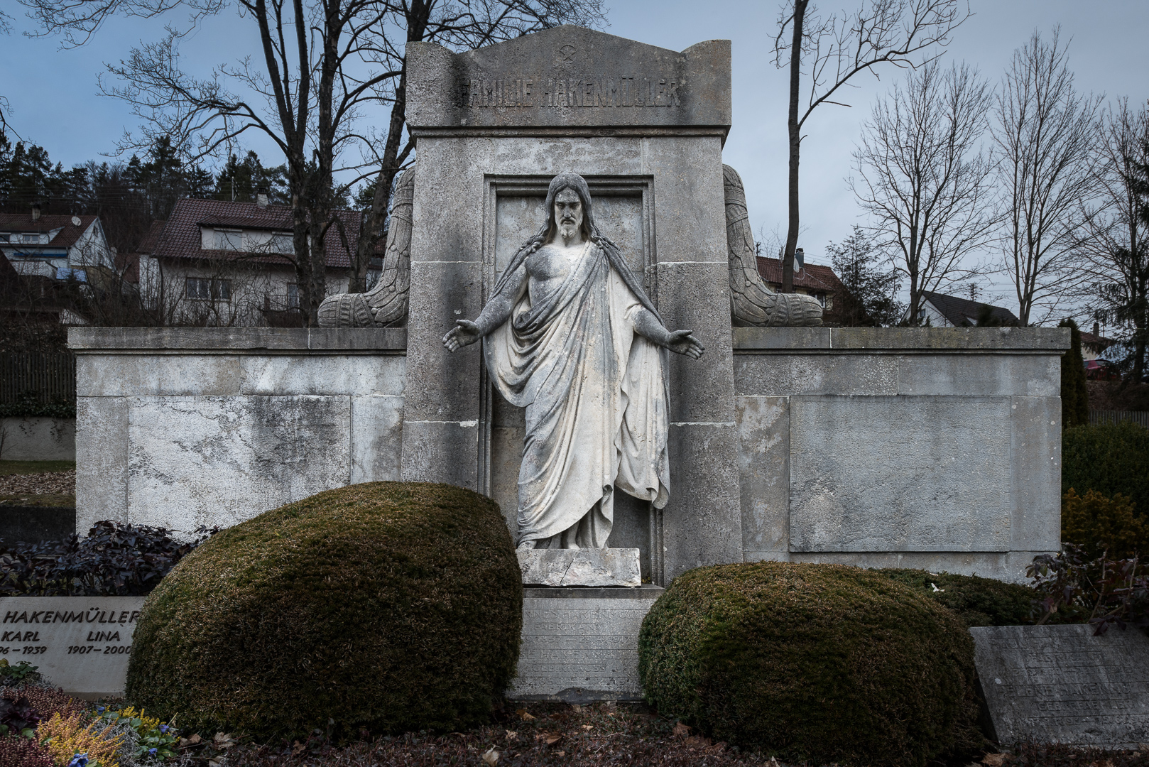 Grabmal der Familien Hakenmüller, Tailfingen, Albstadt